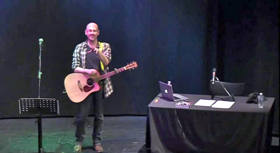 Francis Métivier durant un Rock'n philo live